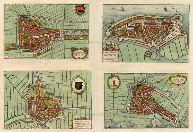 title(s)Edam, Medemblik, Purmerend & Monnickendam; size (4x) 16 x 23